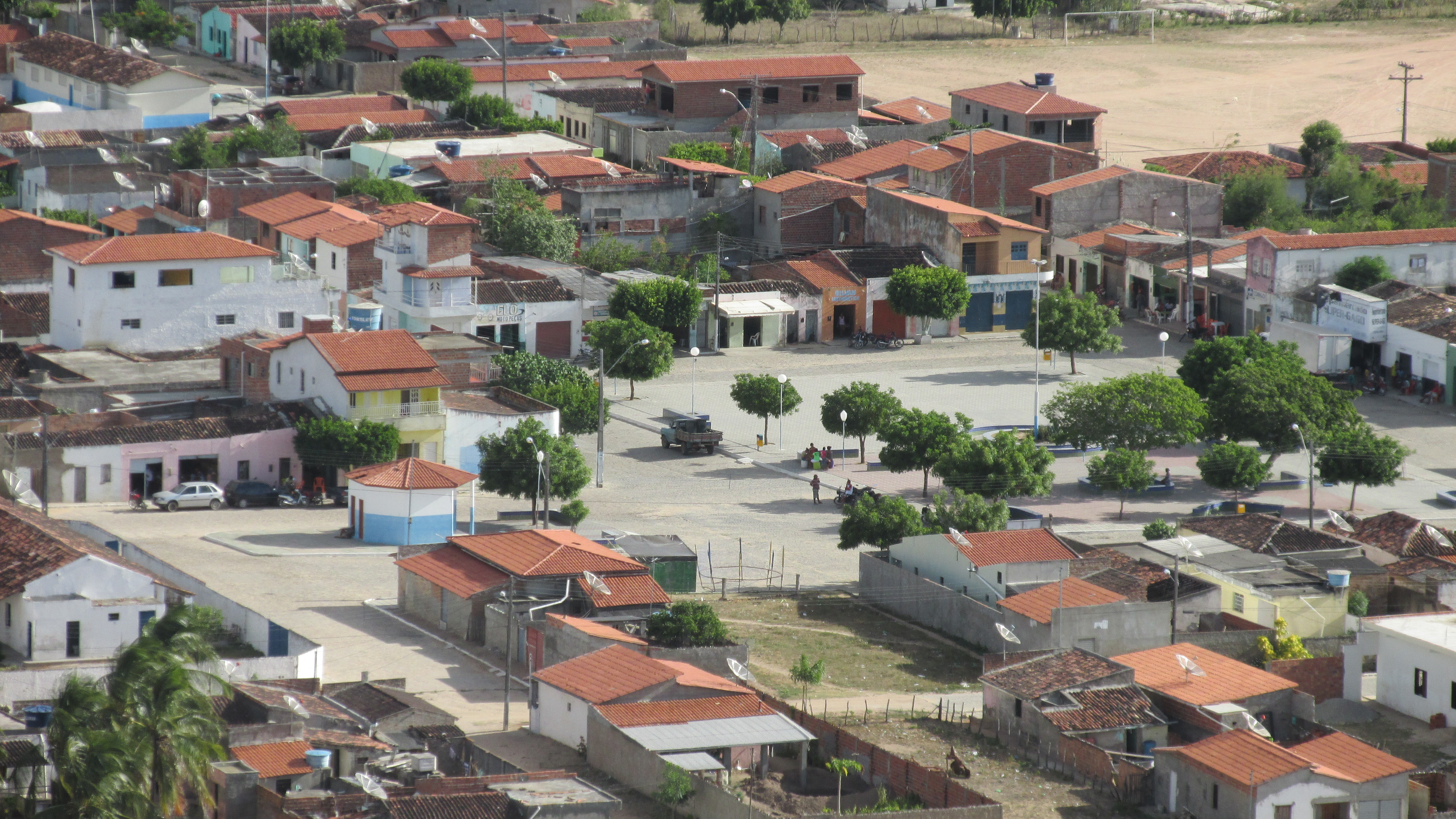 Centro de Pedra Alta - Araci, visto de cima da grande pedra.